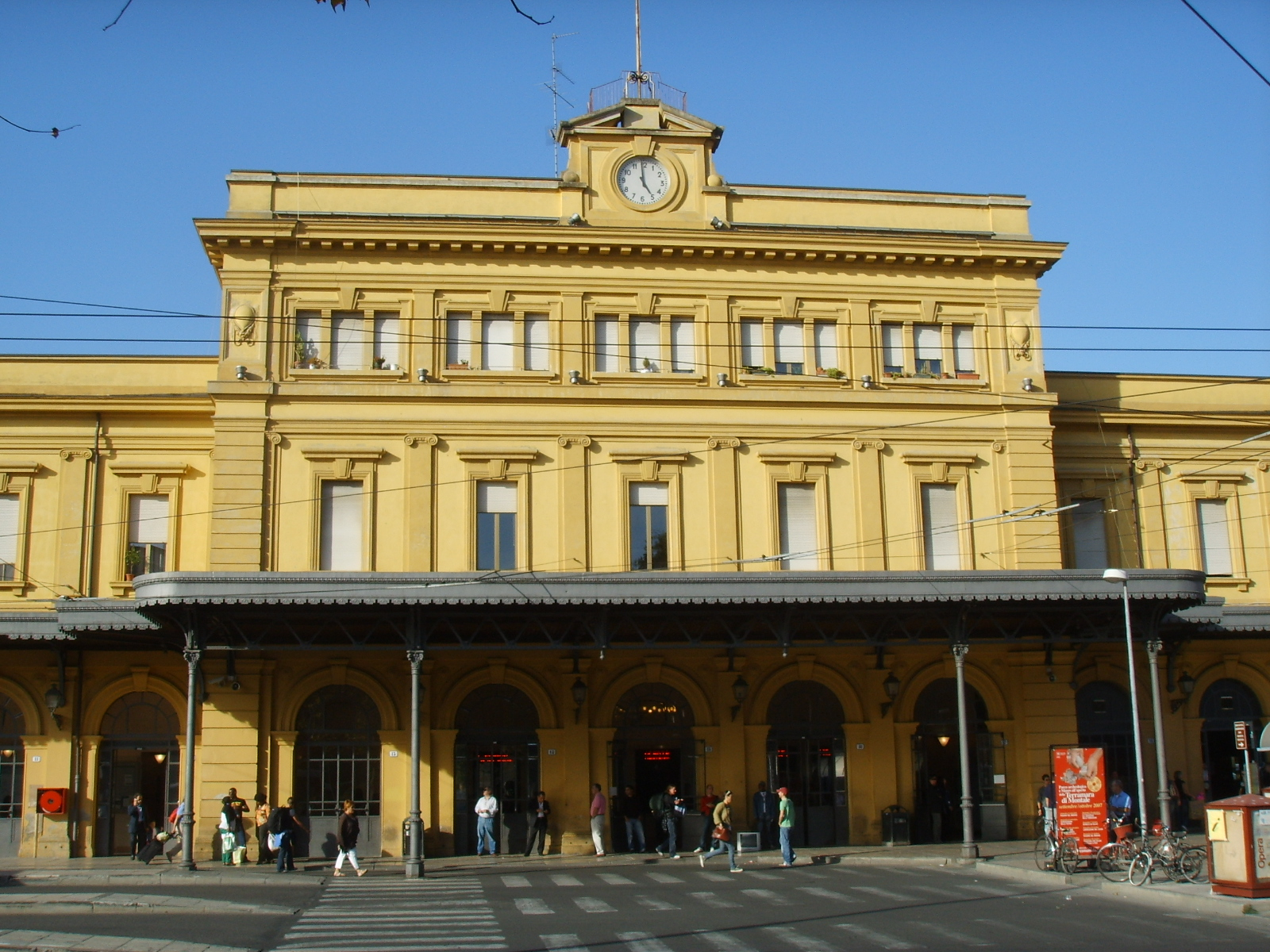 Stazione di Modena